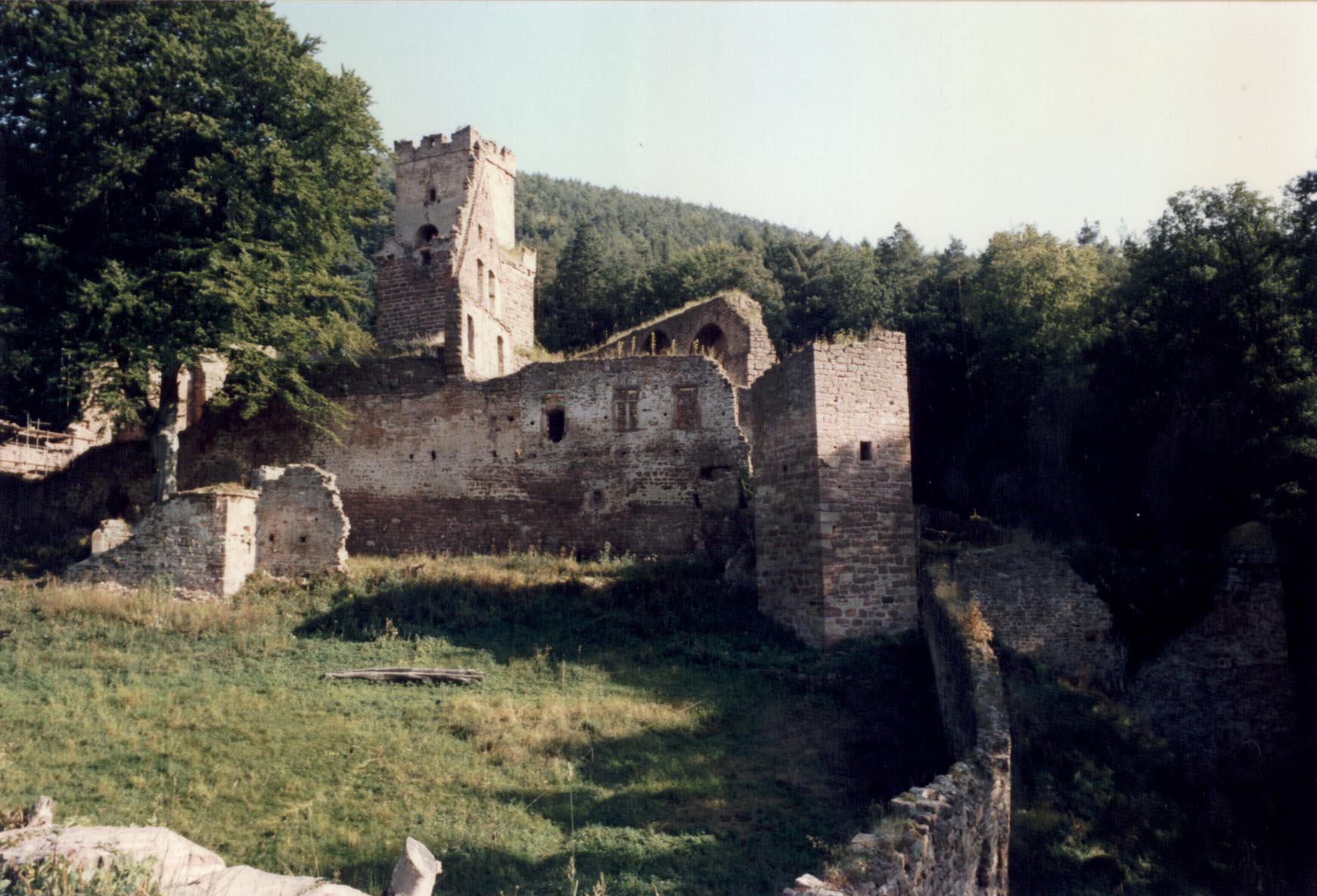 Burg Freudenberg mit dreistufigen Bergfried